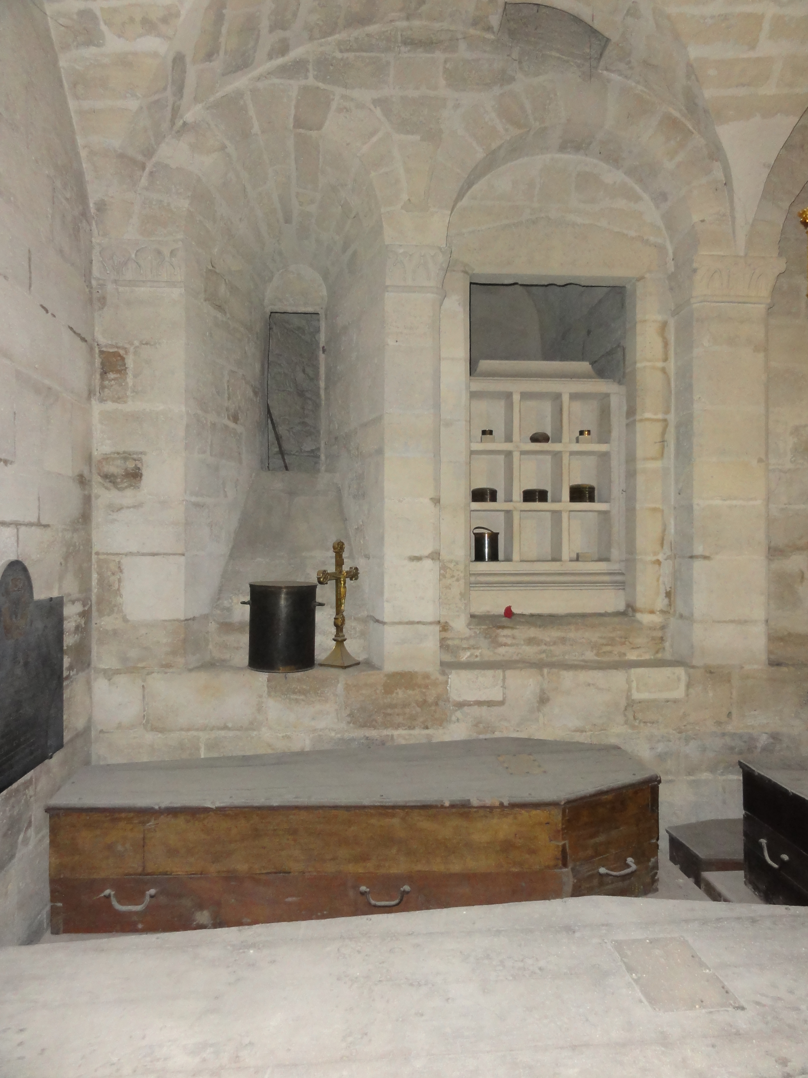 Caveau de membres de la famille royale morts au XIXe s.